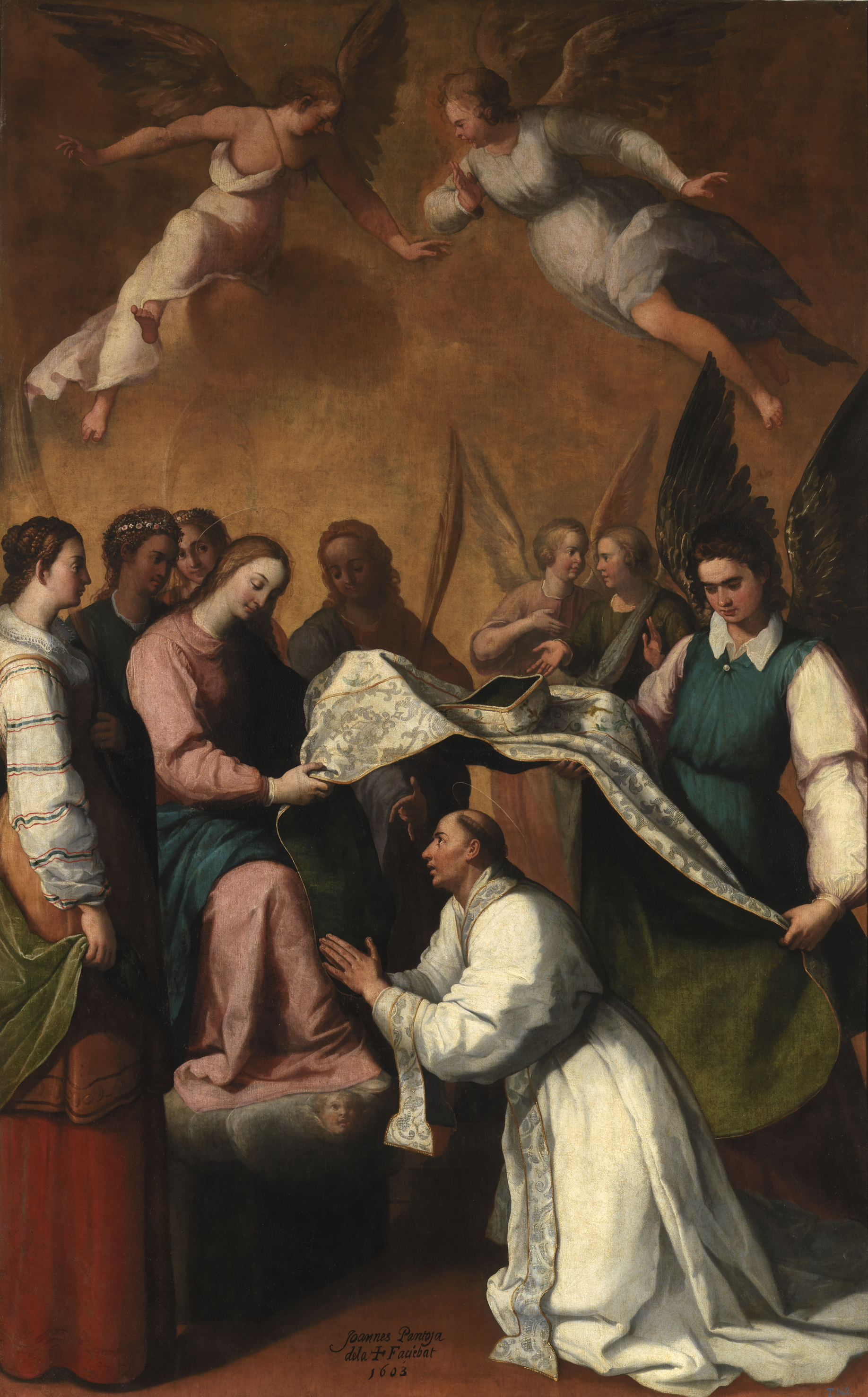 Perteneciente al retablo mayor de la iglesia del colegio de Agustinos Calzados de Madrigal junto con La Anunciación (P4800), La Adoración de los Pastores (P2471) y la Aparición de santa Leocadia a san Ildefonso (P5412). Registrado por Ceán (1800): MADRIGAL / COLEGIO DE AGUSTINOS CALZADOS / Seis quadros en el altar mayor con figuras del tamaño del natural, firmados en 1603. Representan la encarnacion, el nacimiento, la resurreccion y la ascension del hijo de Dios; S. Ildefonso recibiendo la casulla de mano de la Virgen; y el mismo santo cortando el cendal a santa Leocadia. Los cuadros con La Resurrección y La Ascensión de Cristo no aparecen registrados en ninguno de los inventarios conocidos. Es probable que fueran sustraídos o vendidos fraudulentamente como inservibles en alguna subasta. En cualquier caso, se desconoce su paradero. Los cuatro registrados en el Inventario general de los cuadros de la Trinidad existentes en el depósito y escogidos por la Comisión de la Academia fueron expuestos en el salón grande de la Galería Principal del Museo de la Trinidad (Inventario de los cuadros y estatuas presentados en la inauguración del Museo Nacional de la Trinidad el 24 de junio de 1838).